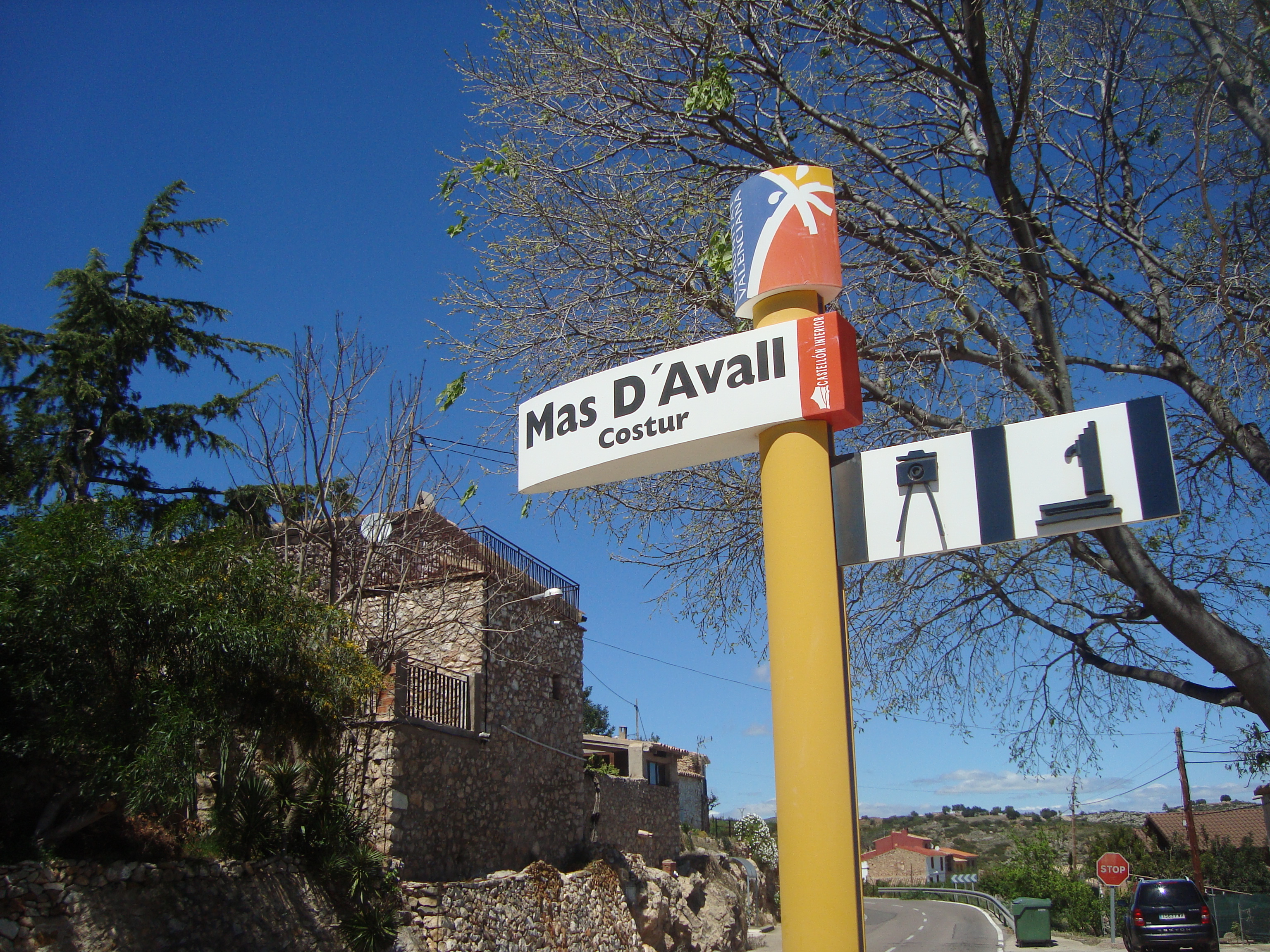 Mas D'Avall (Costur)